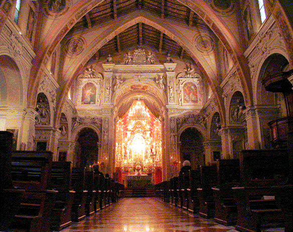 Interno della chiesa di San Vittore